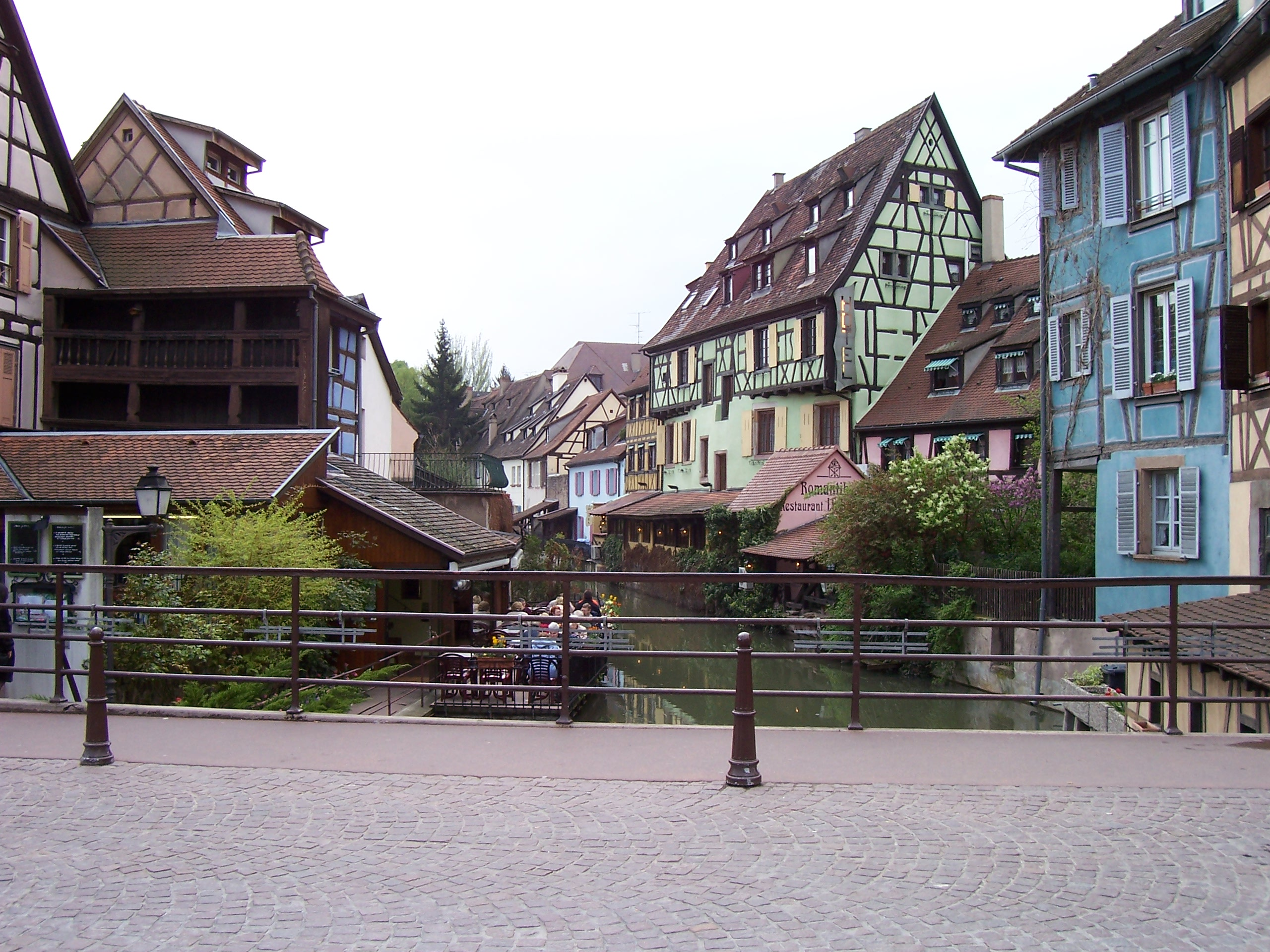 Vue sur la Petite Venise, Colmar, France